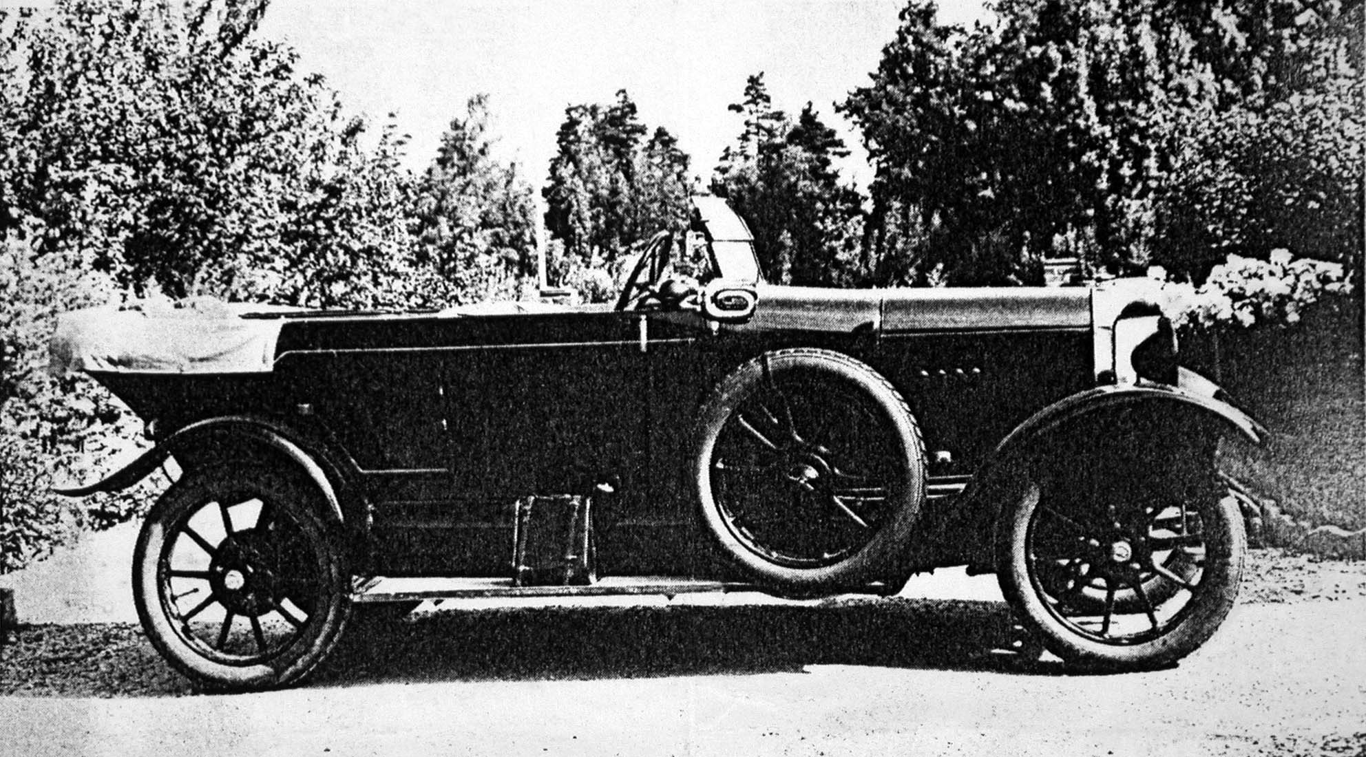 Selve 6/24 PS, modèle 1919-1920, torpédo, carrosserie de série.